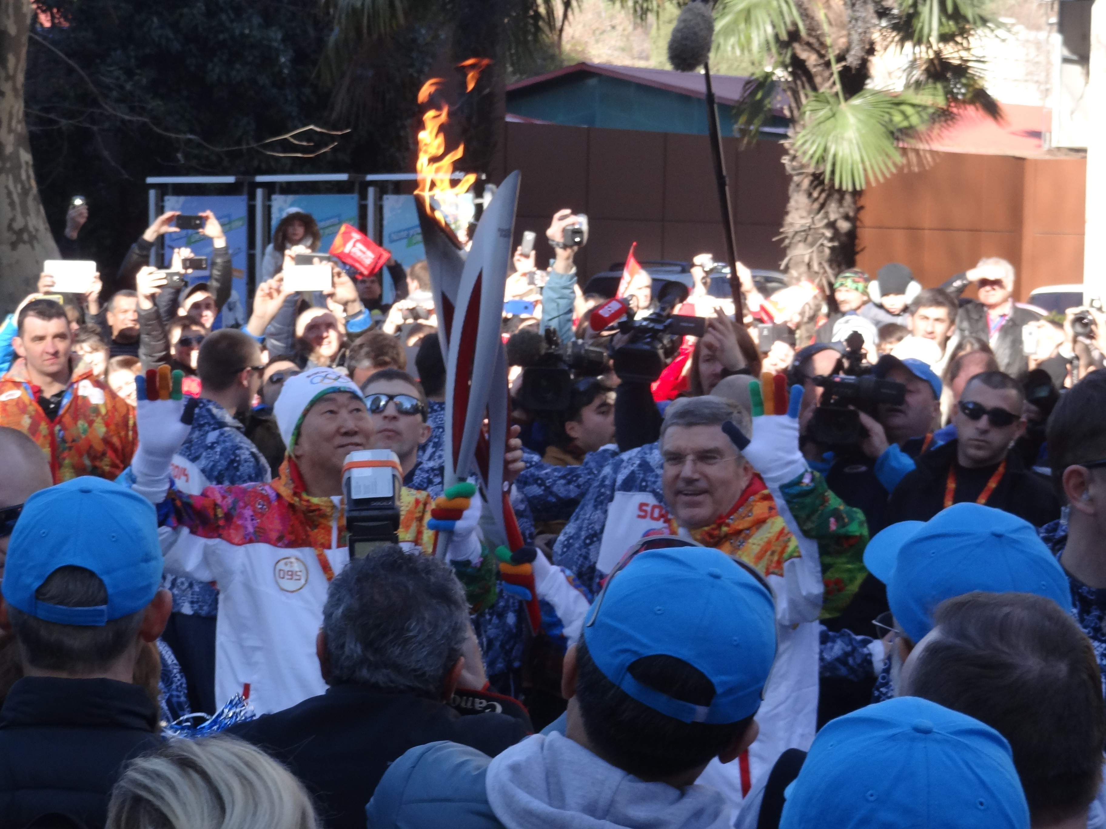 6 февраля 2014 г. Огонь XXII Олимпийских зимних игр по улице Орджоникидзе вдоль набережной Чёрного моря пронесли Президент Международного Олимпийского комитета Томас Бах и Генеральный секретарь Организации объединенных наций Пан Ги Мун.